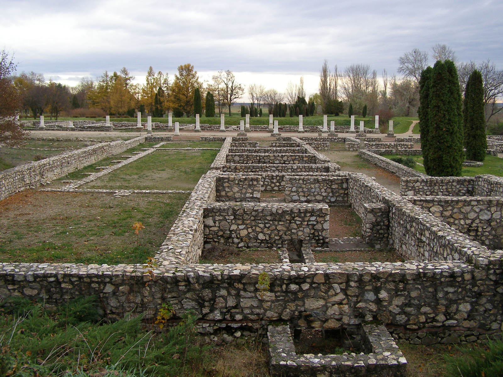 Fövénypusztai római telep (Tác, Fövénypuszta) This is a photo of a monument in Hungary, Identifier: 3940